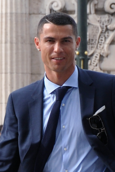 El Real Madrid ofrece la Champions a la Virgen de la Almudena. Créditos: archimadrid / José Luis Bonaño.